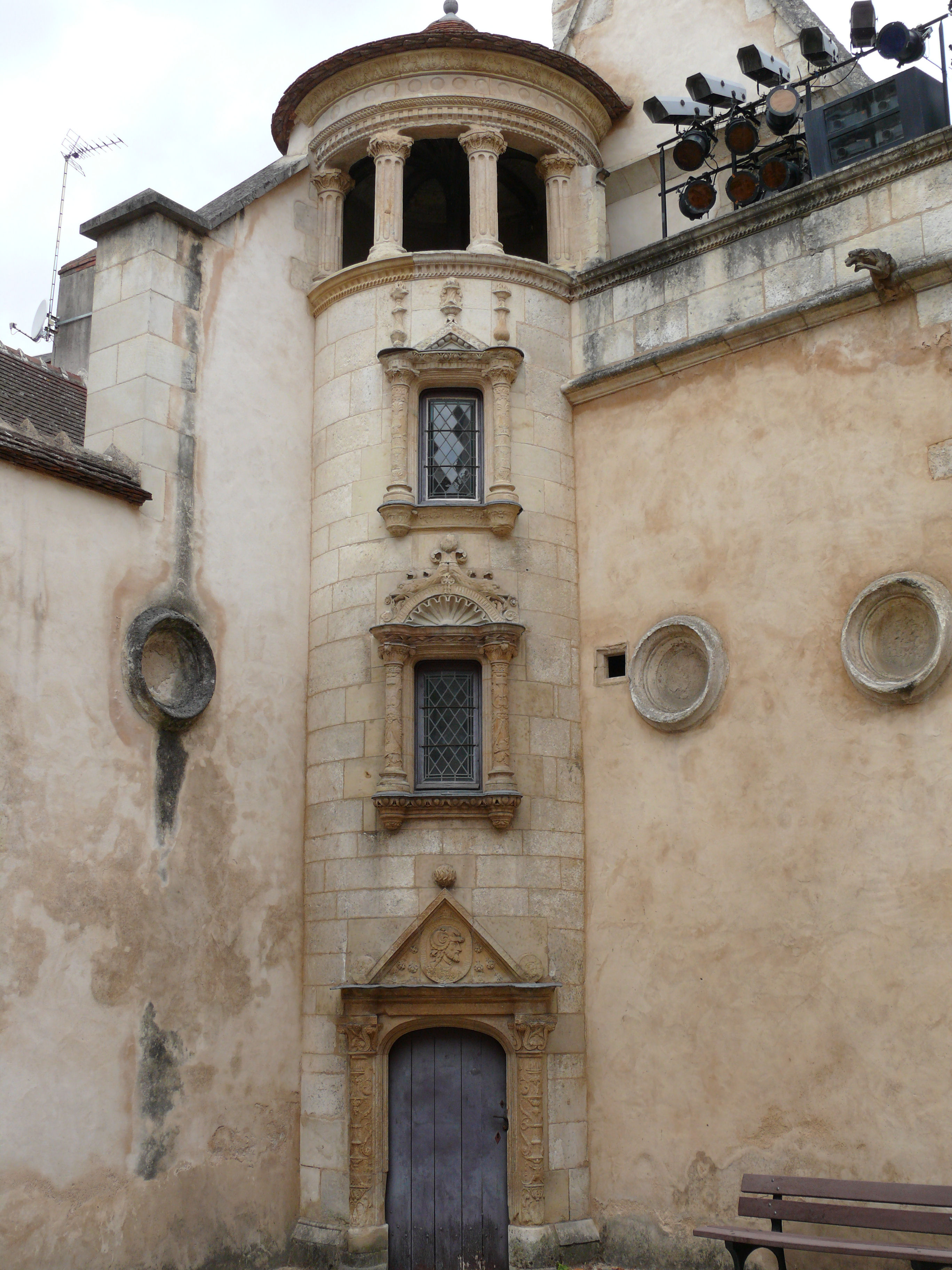 Bourges - Hôtel Lallemant - Façade sur cour -Tourelle